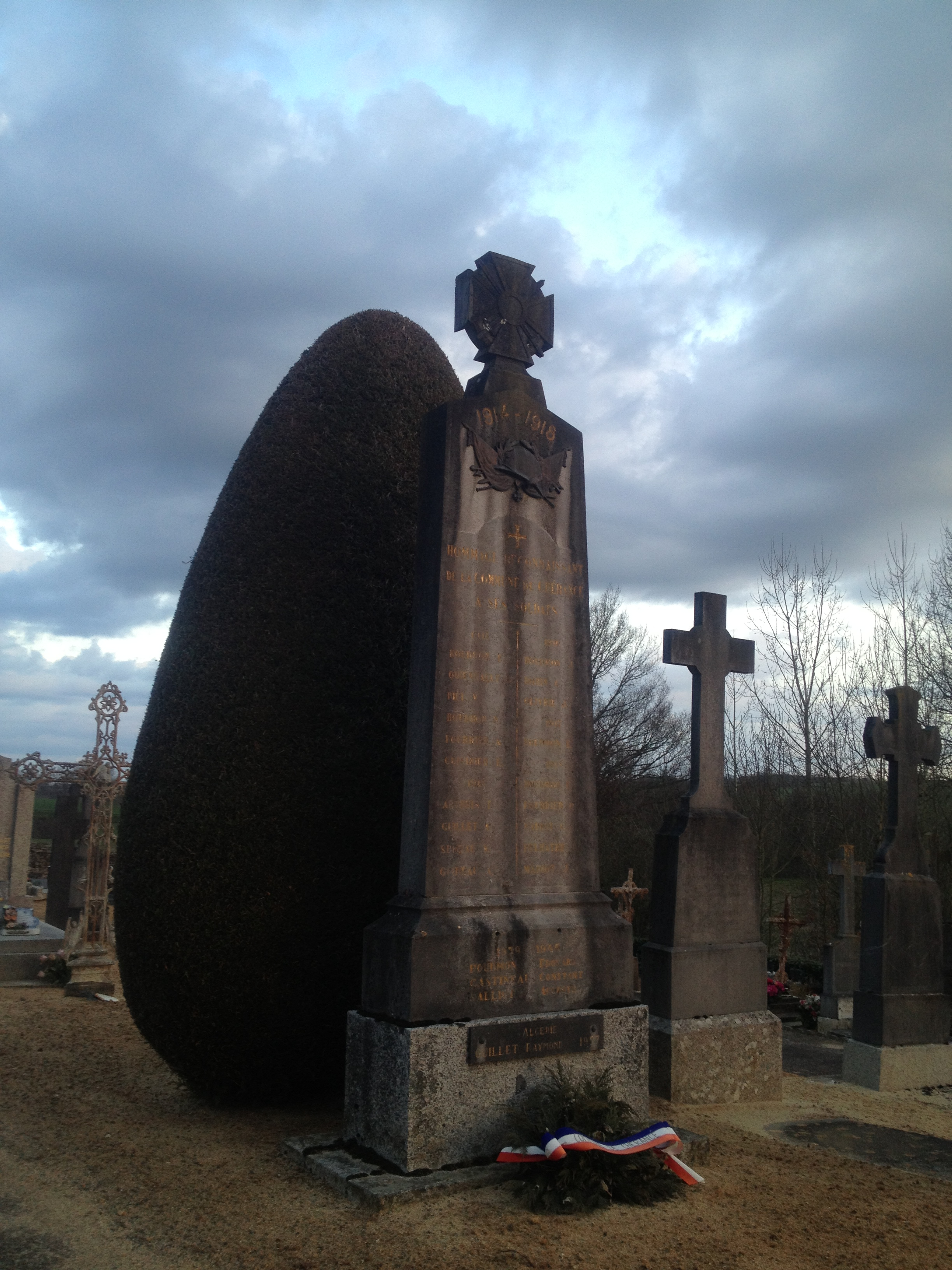 Mayenne, France